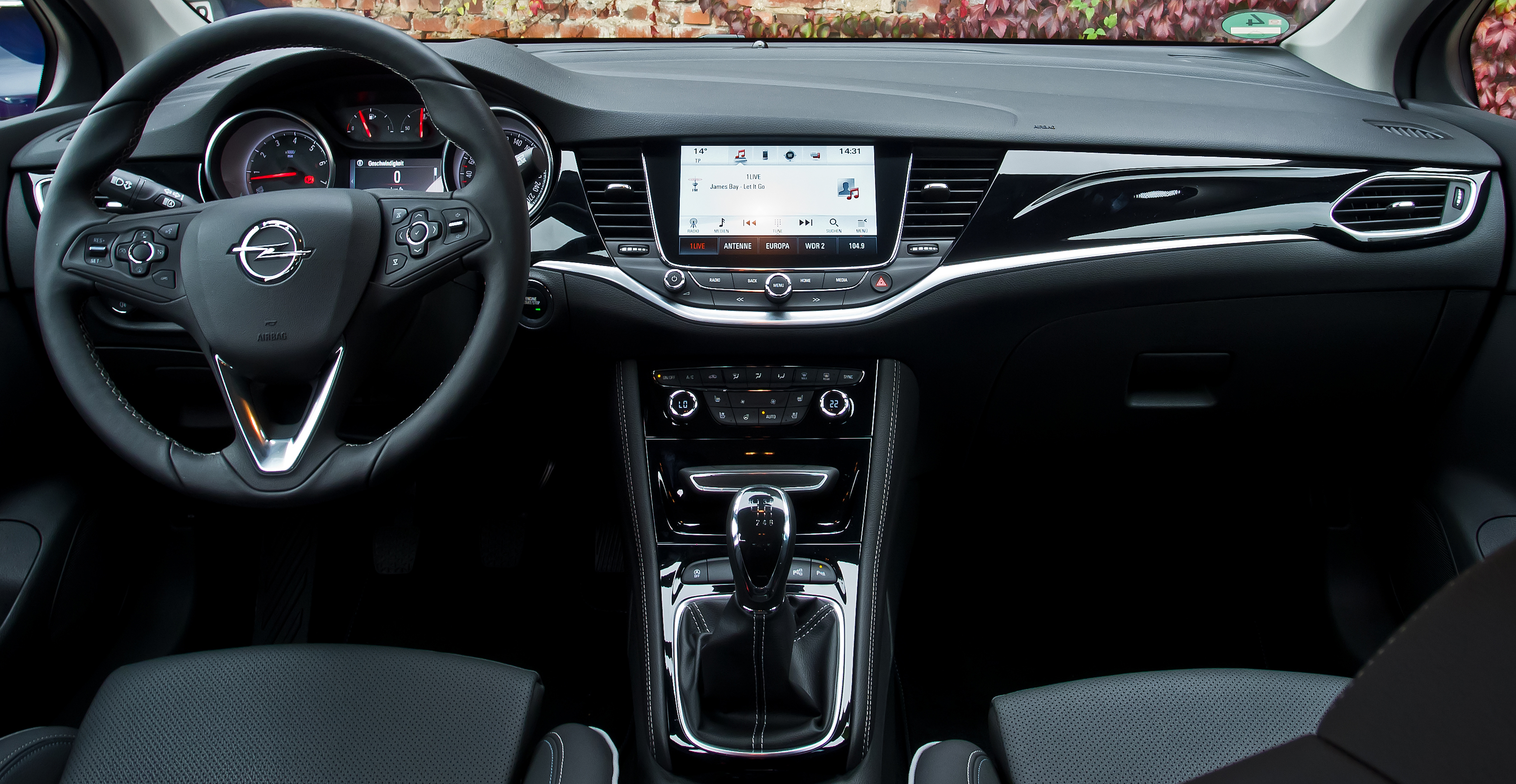 Opel Astra 1.4 EDIT ecoFLEX Innovation (K)